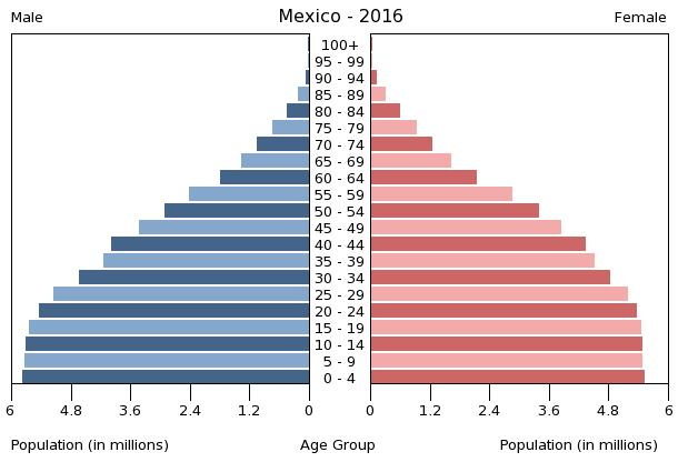 A population pyramid illustrates the age and sex structure of a country's population and may provide insights about political and social stability, as well as economic development. The population is distributed along the horizontal axis, with males shown on the left and females on the right. The male and female populations are broken down into 5-year age groups represented as horizontal bars along the vertical axis, with the youngest age groups at the bottom and the oldest at the top. The shape of the population pyramid gradually evolves over time based on fertility, mortality, and international migration trends.